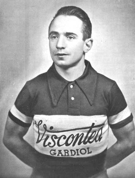 ciclista italiano